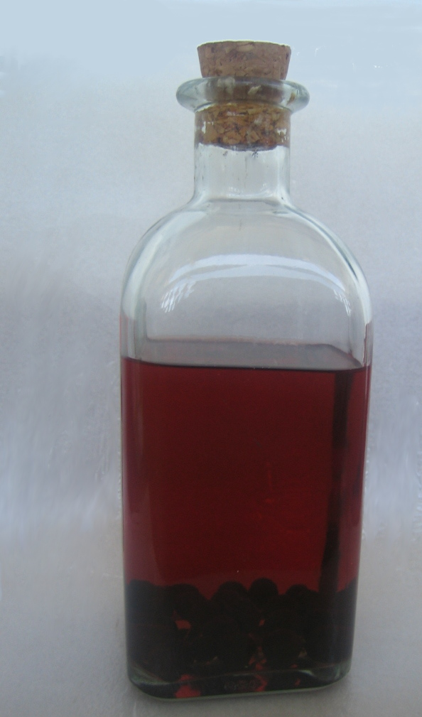 Botella de Patxaran